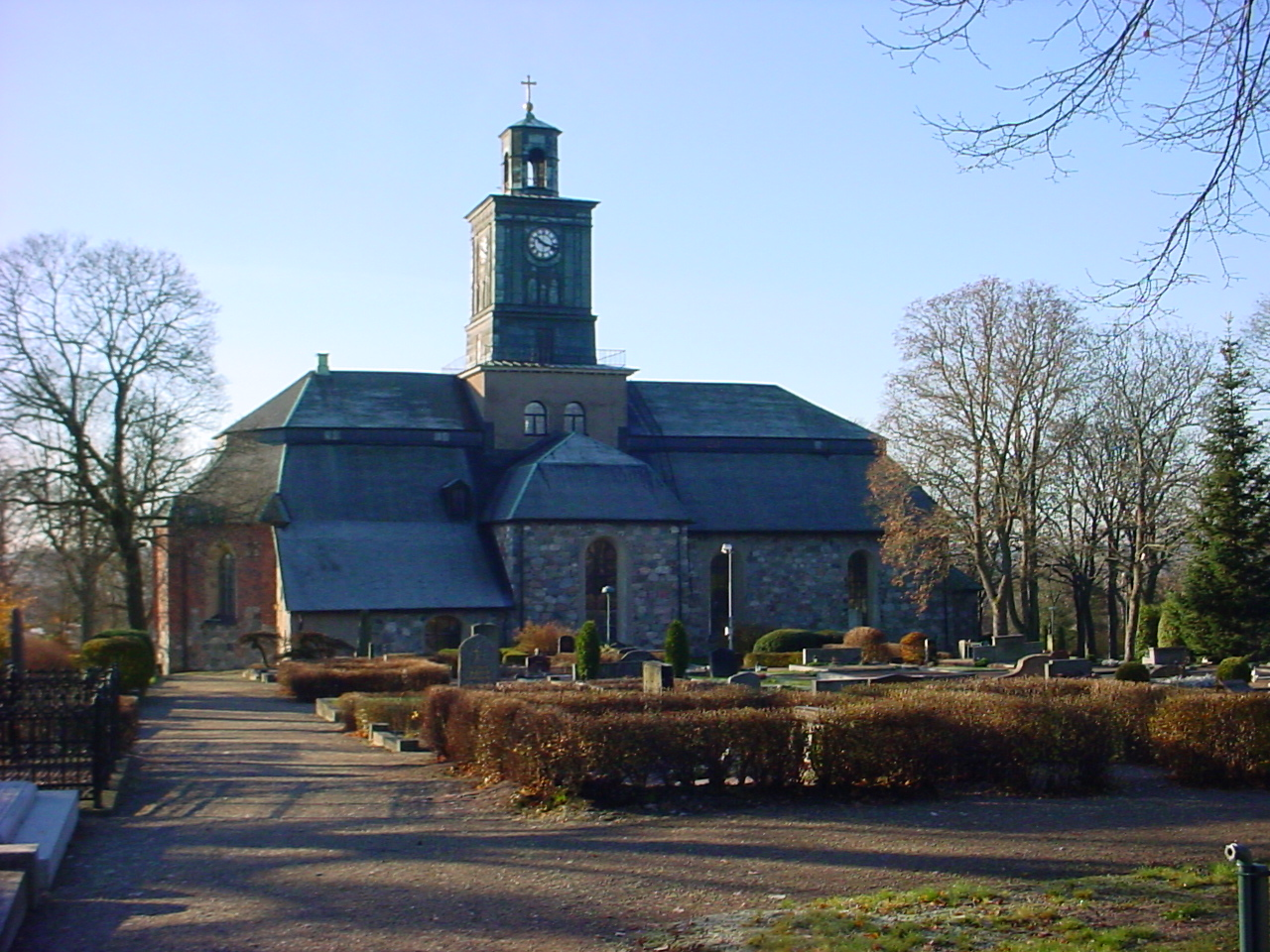 Enköping, Vårfrukyrkan.